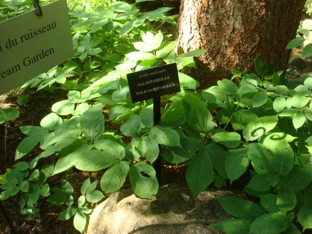 Fausse salsepareille, photo prise aux jardin de Métis, Grand-Métis, Québec, Canada. Été 2009.